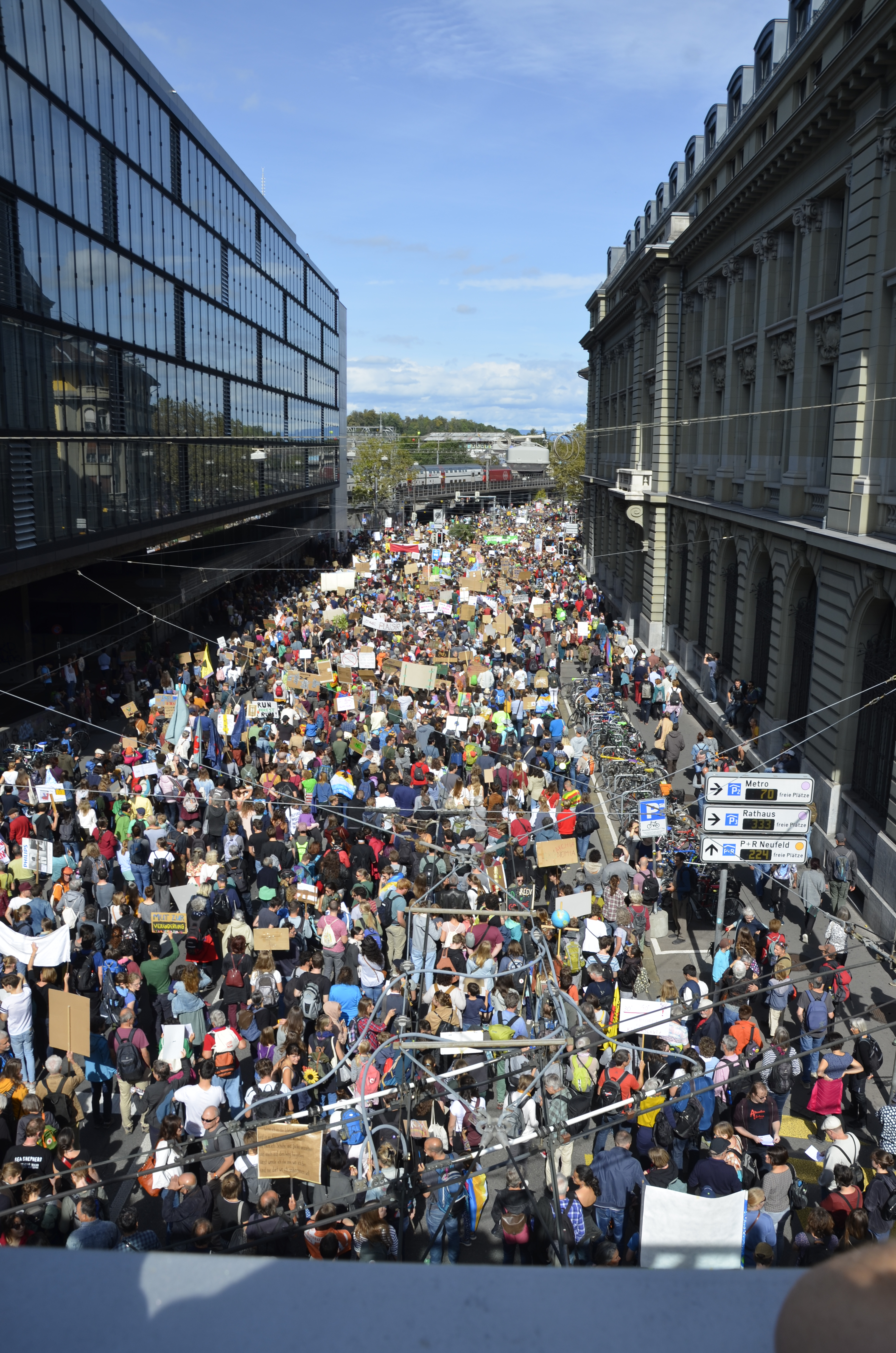 Klimademo Bern Bollwerk